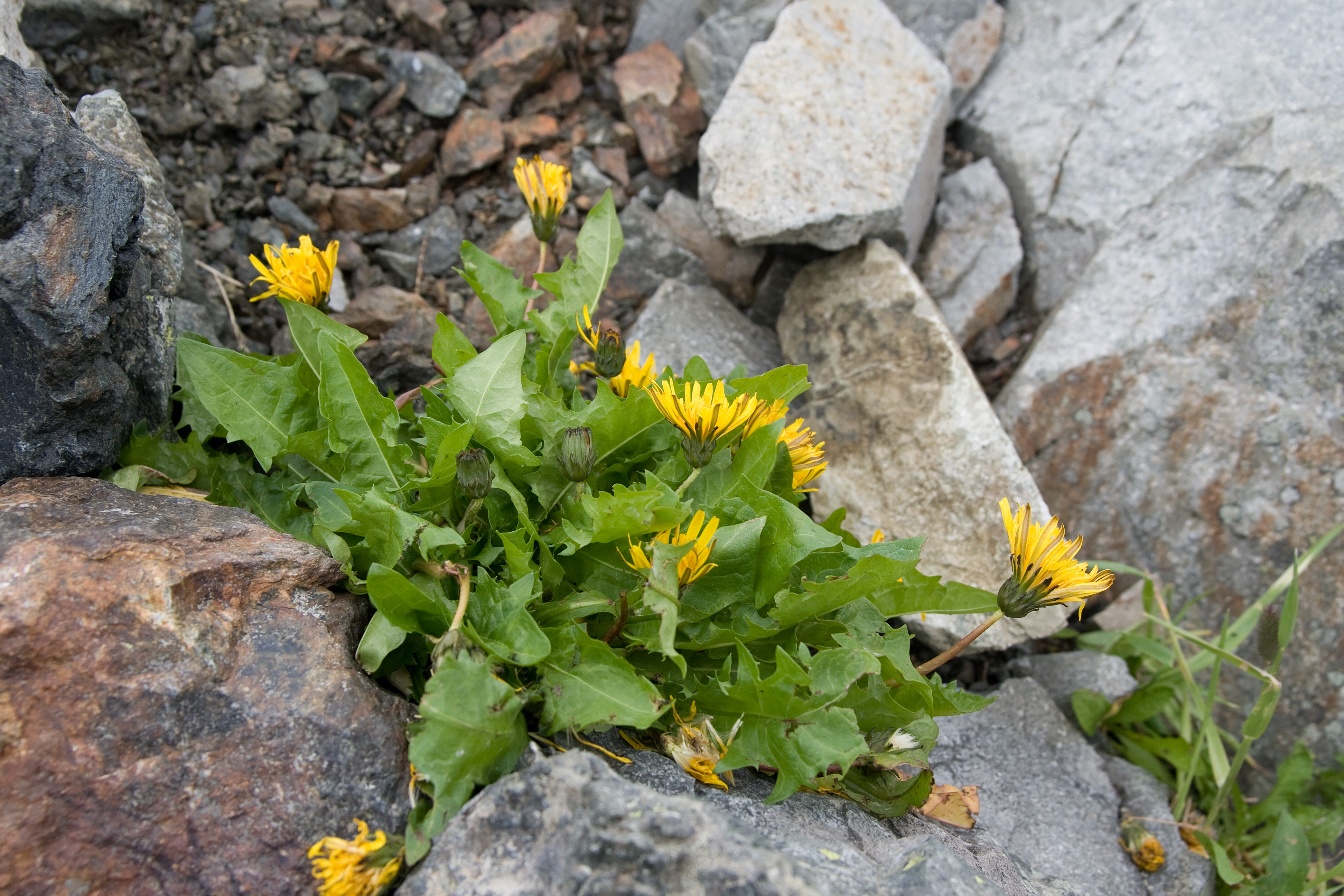 シロウマタンポポ (学名：Taraxacum alpicola var. shiroumense )